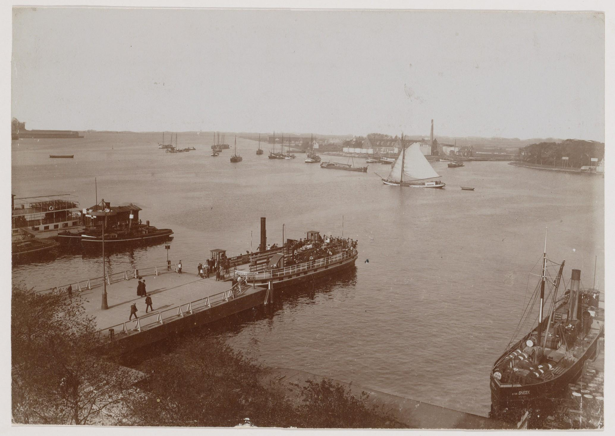 Beschrijving De Ruijterkade Met gemeenteveren, gezien in noordelijke richting naar Tolhuispont. Documenttype foto Vervaardiger Boek-, kantoor- en papierhandel J. Vlieger Collectie Collectie Stadsarchief Amsterdam: foto-afdrukken Geografische naam De Ruijterkade Inventarissen Afbeeldingsbestand OSIM00006000468 Generated with Dememorixer